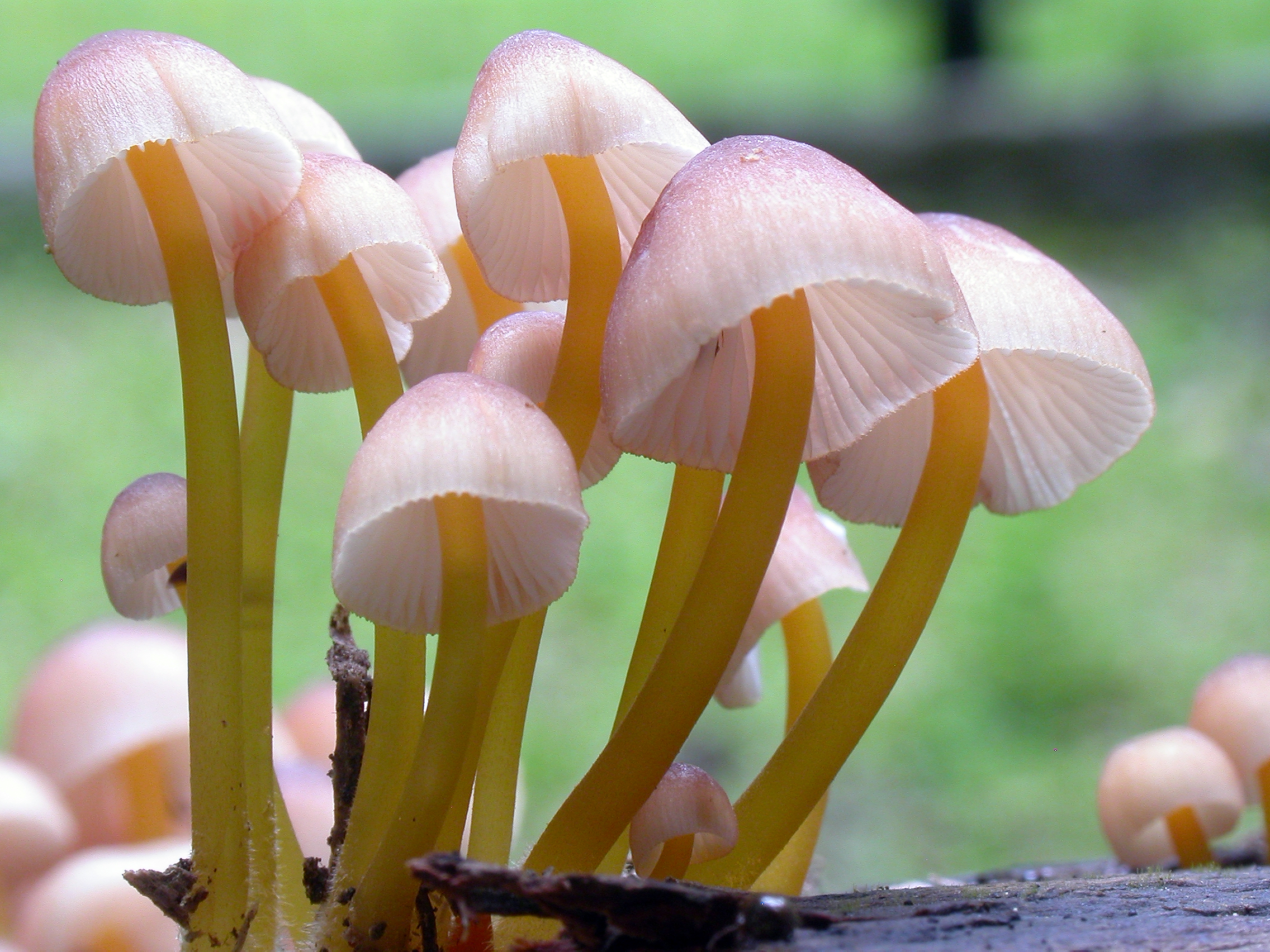 Sopparten prydhette (Mycena renati)